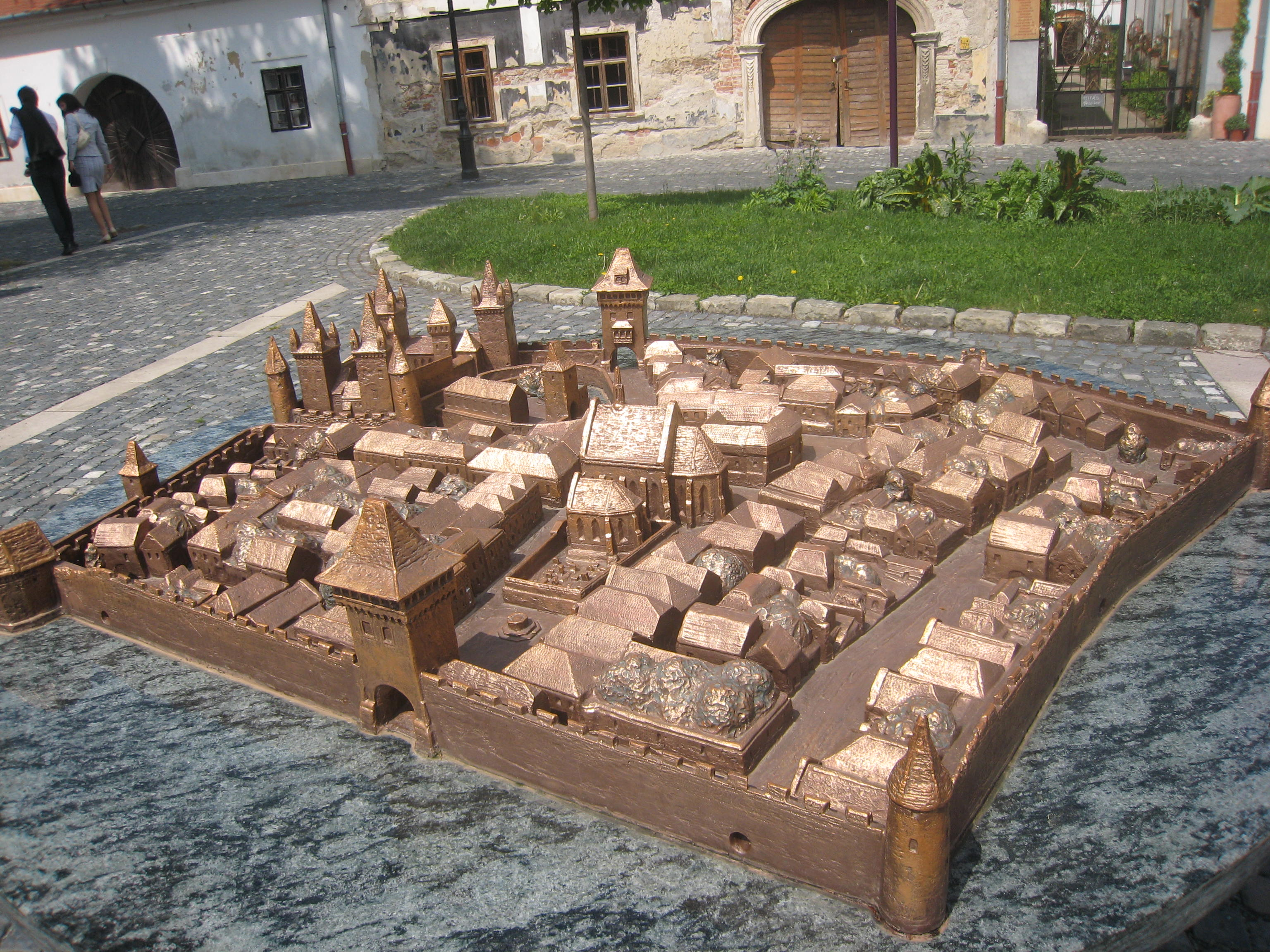 Kiseg, maketa sredjeveškega mesta.